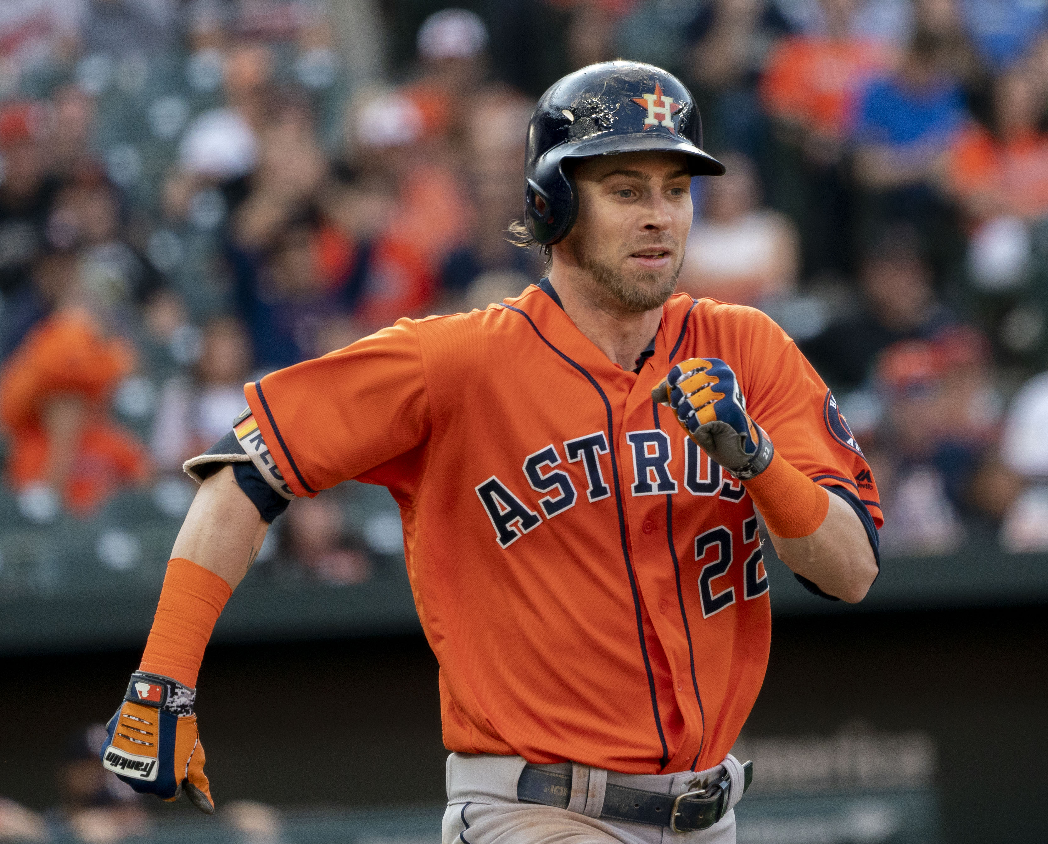 Astros at Orioles 09/29/18